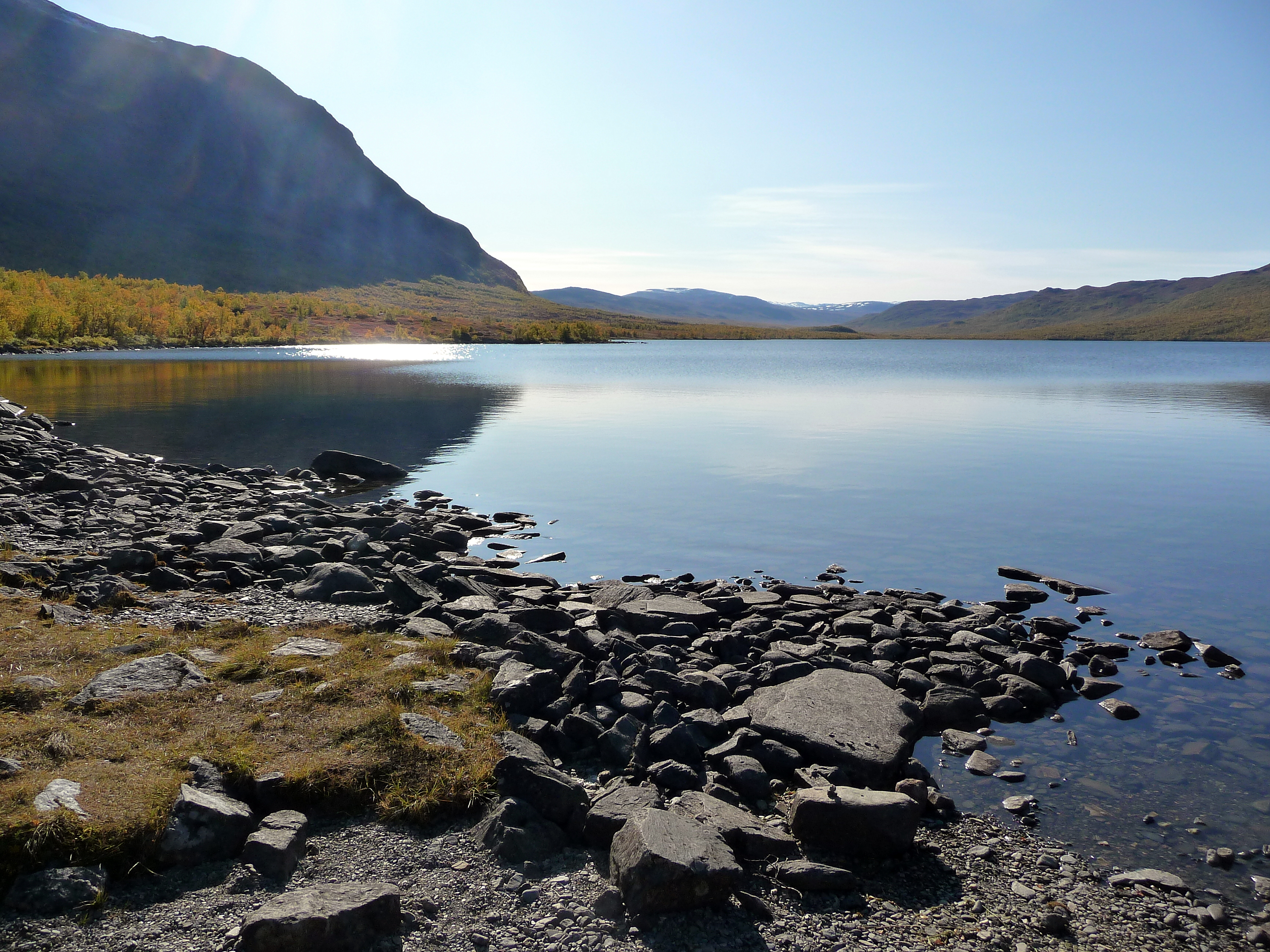 A view over Abiskojaure (sam.: Abiskojávri), looking towards the Abiskojaure STF hut.